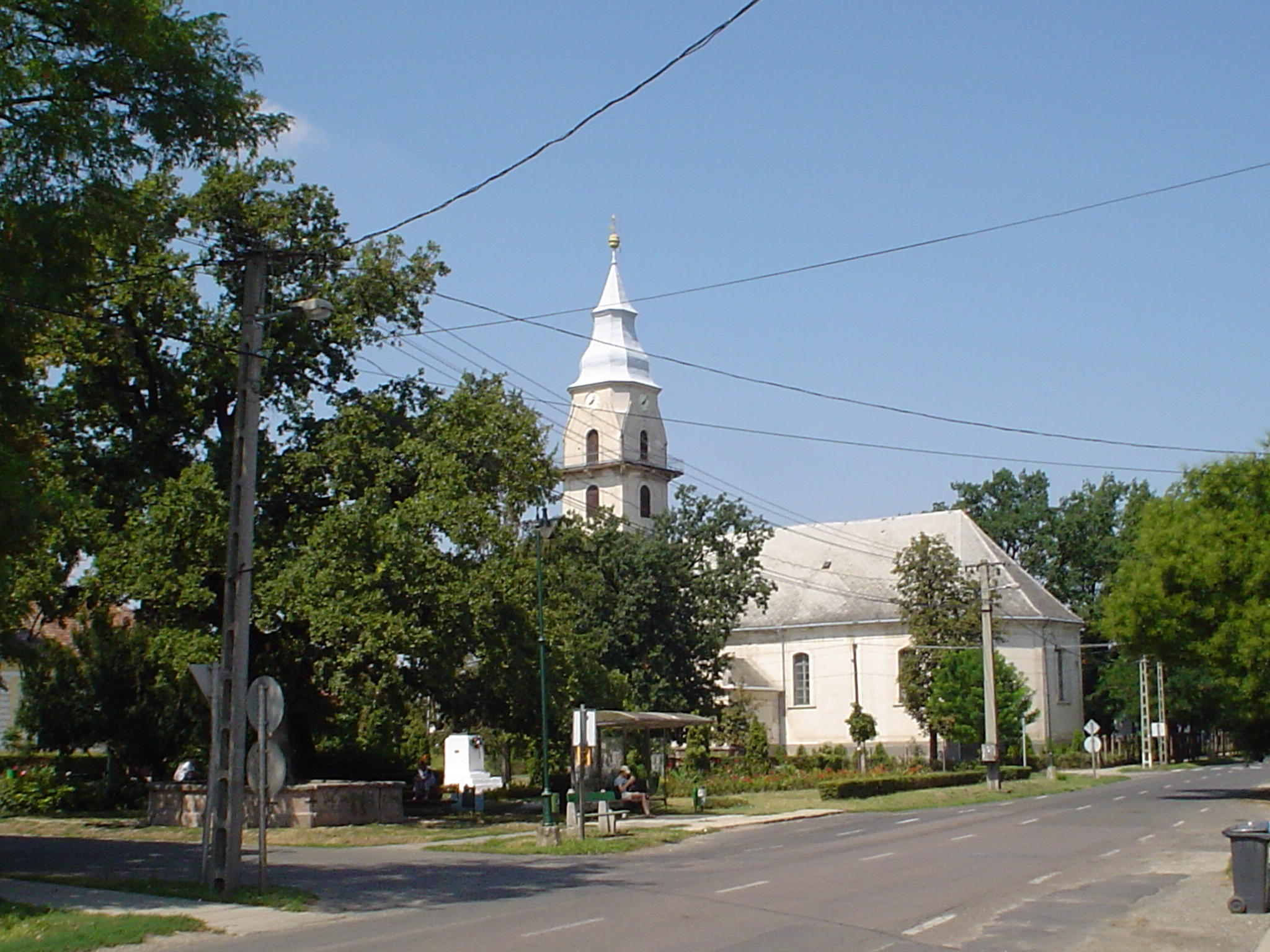 Tiszaföldvár főtere a templommal.